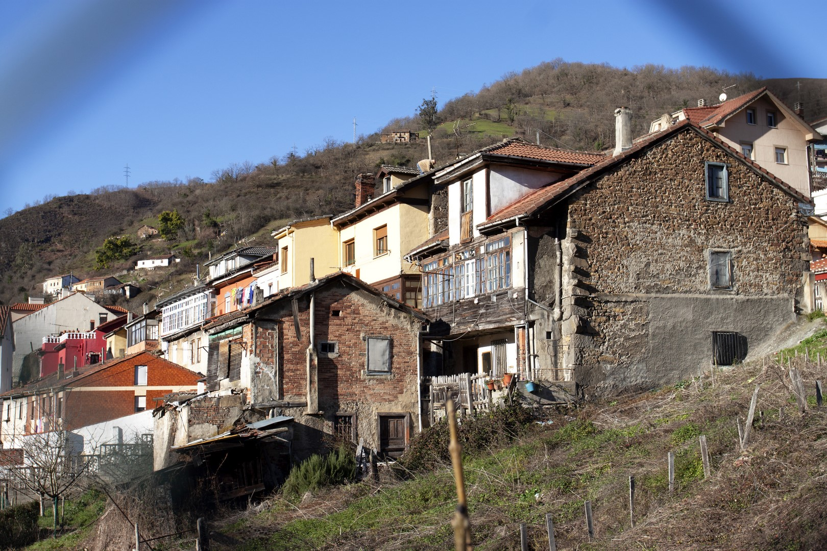 Caborana, Aller, Asturias